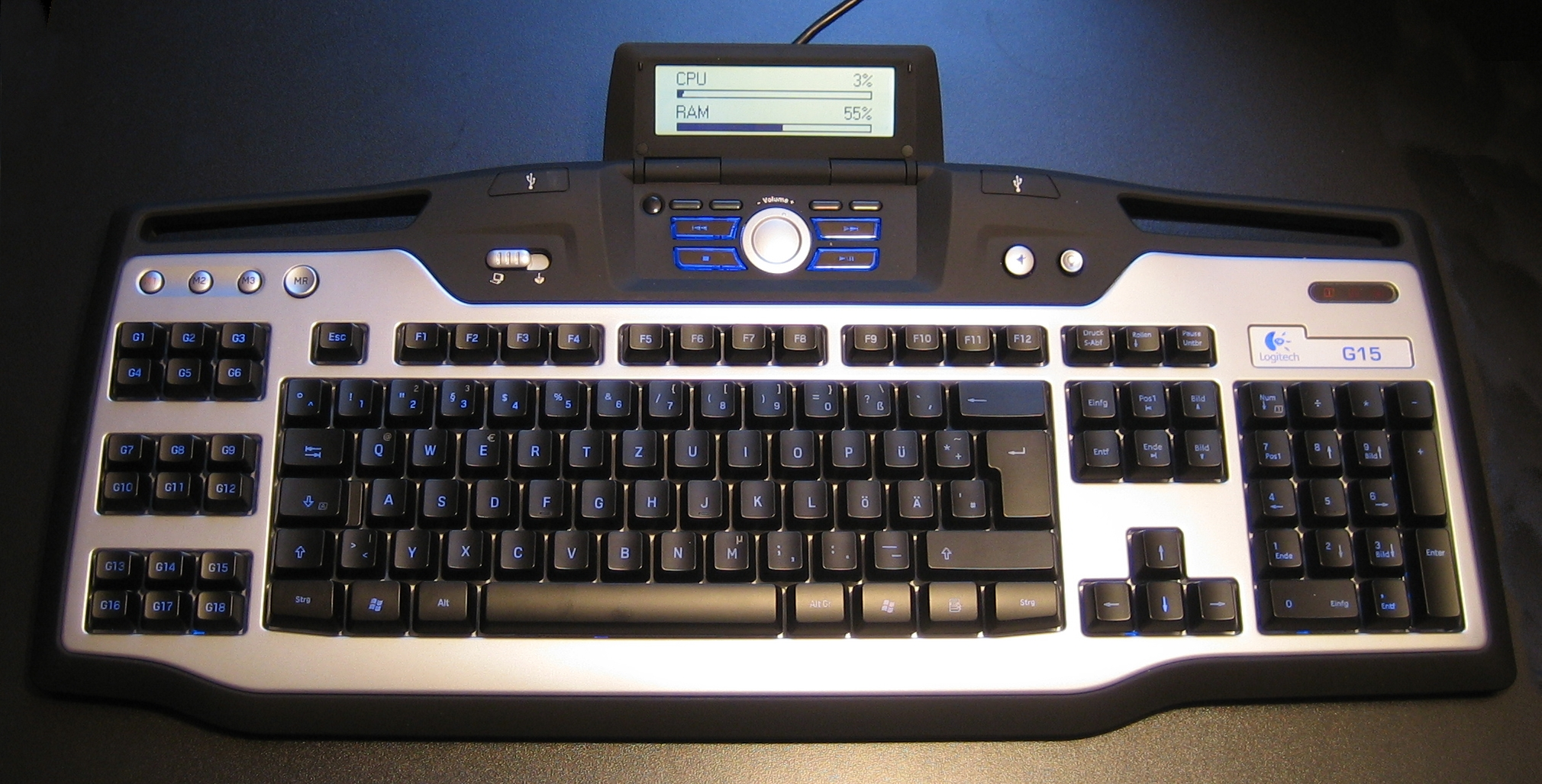 Bildbeschreibung: Logitech G15 Gaming-Keyboard Quelle: selbst fotografiert Fotograf/Zeichner: Der Franke Datum: 09.04.2006